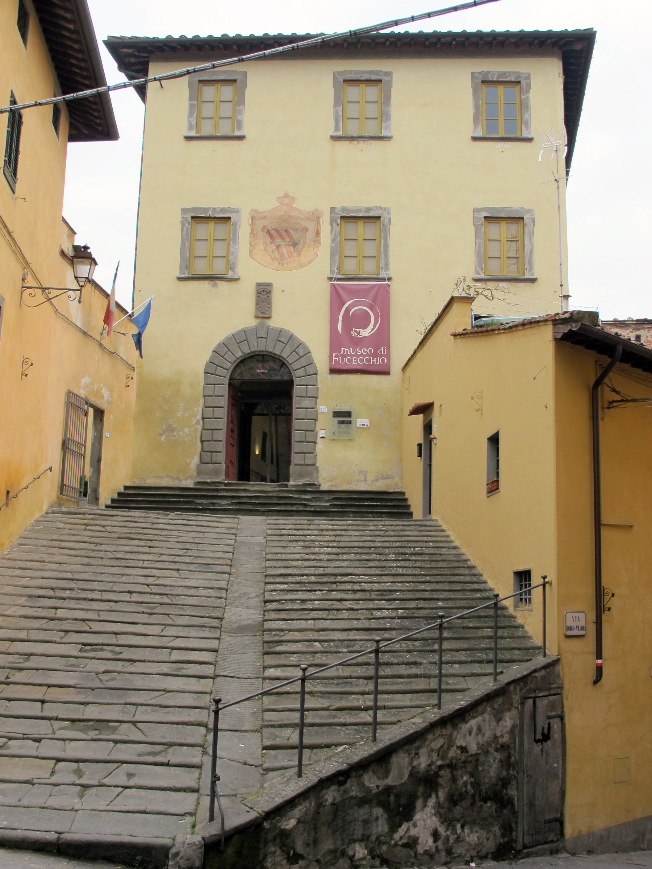 Museo di fucecchio